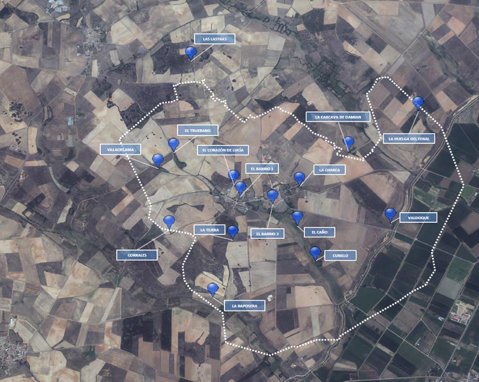 Ubicación de las fuentes de navafria